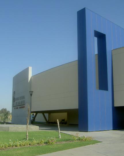 Casa de Cultura del Estado